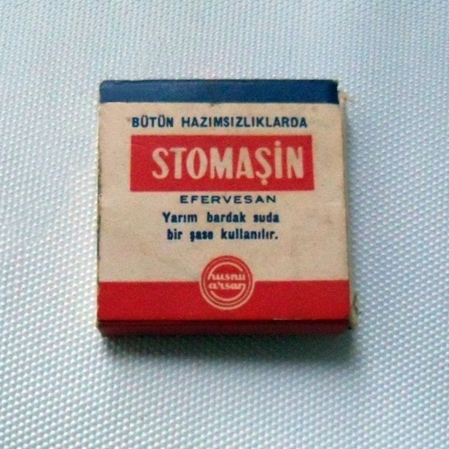 Stomaşin